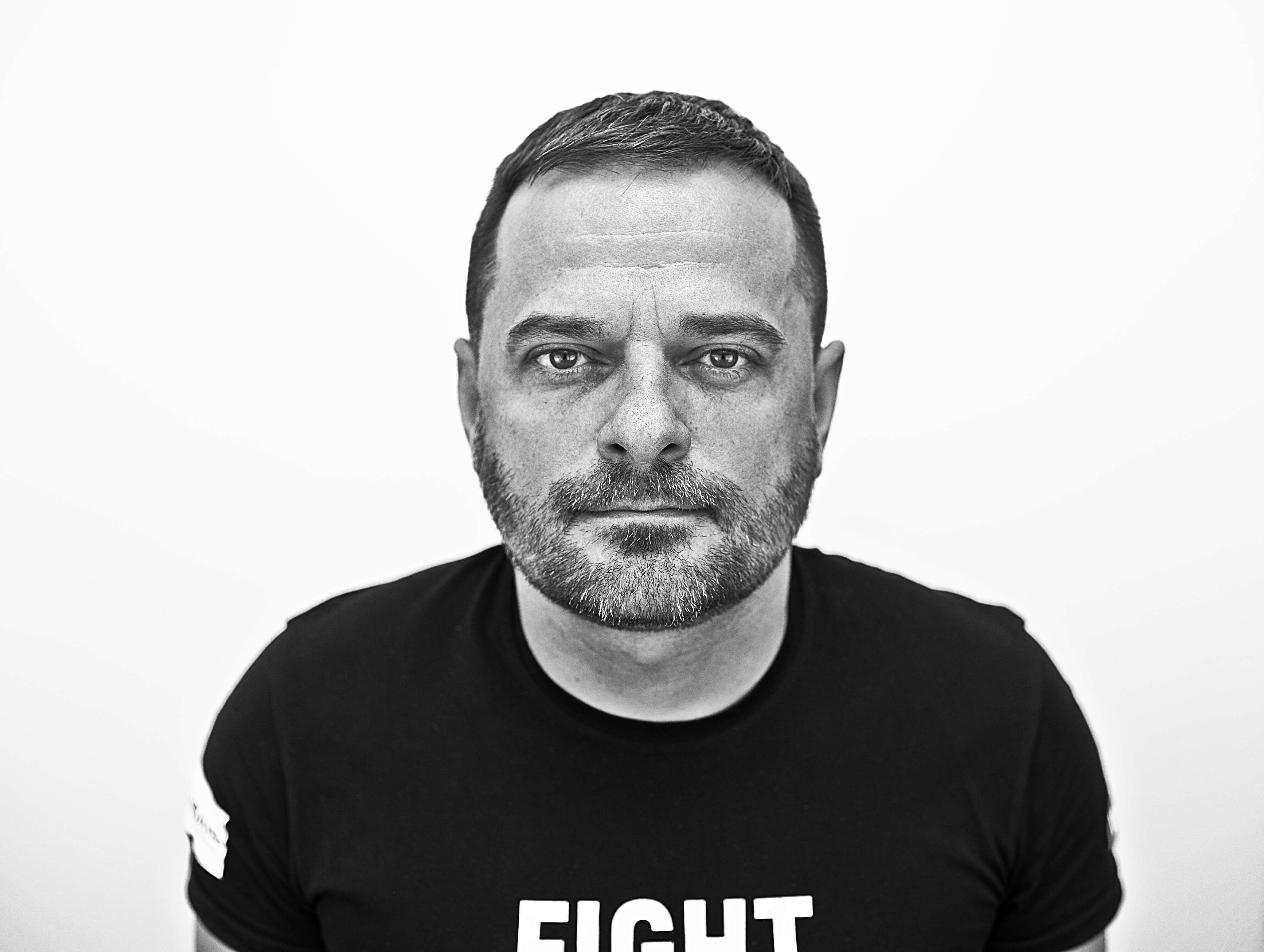 Фото Дмитра Шерембея